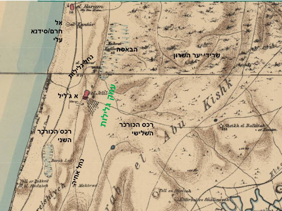 עמק גלילות כפי שהיה בסביבות 1880